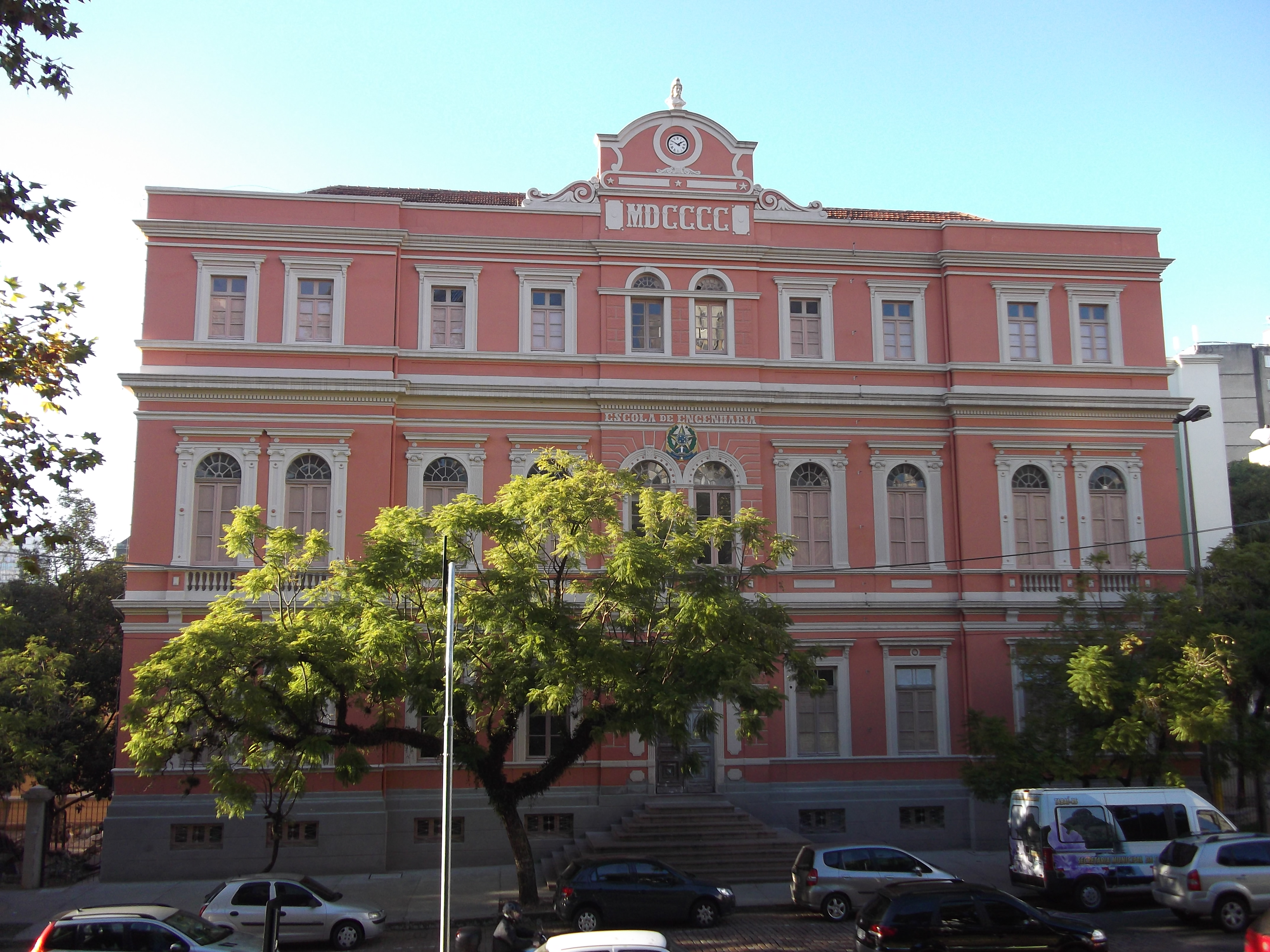 Escola de Engenharia da UFRGS